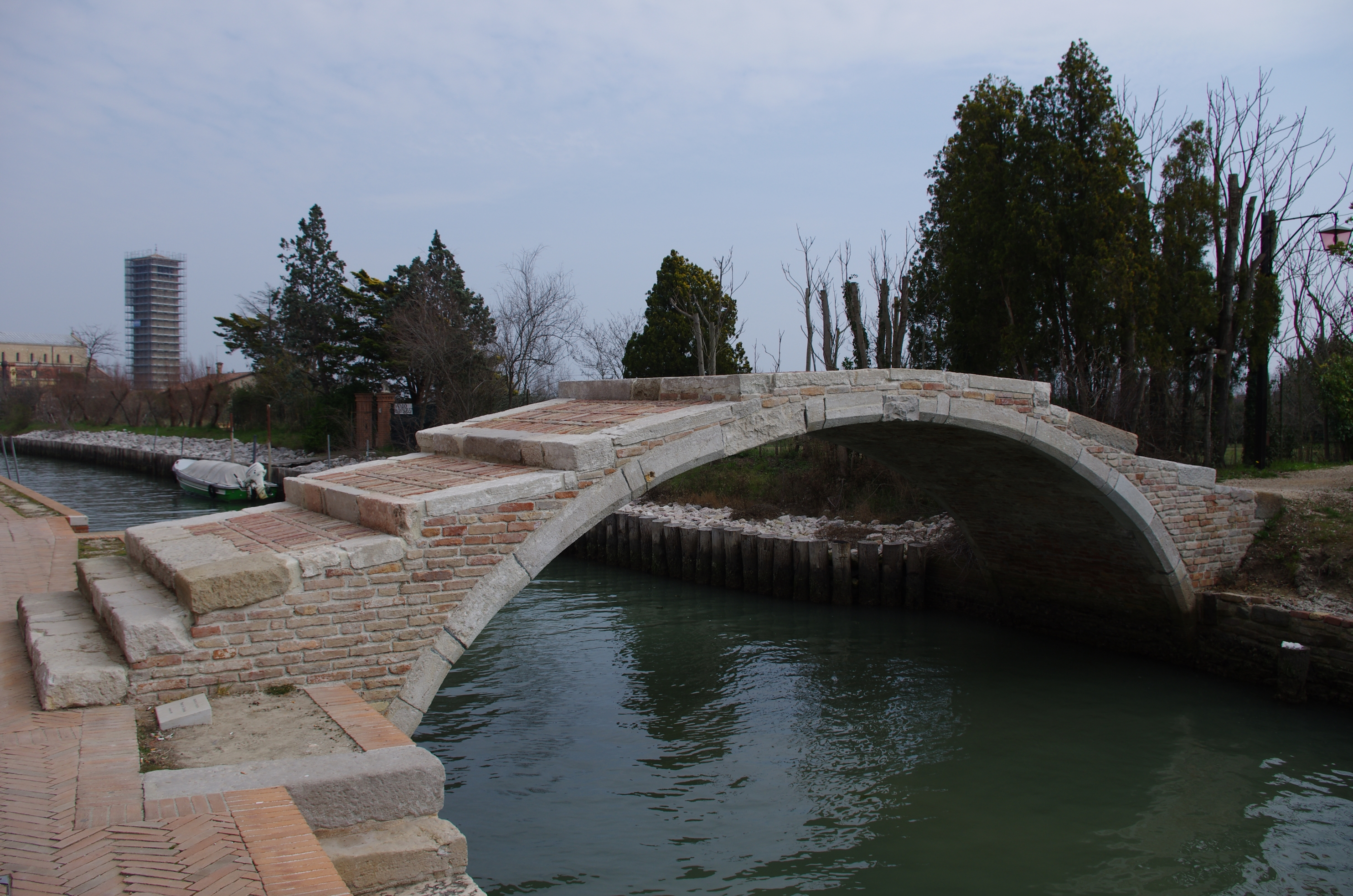 Torcello, eine Insel in der Lague von Venedig. Die Teufelsbrücke (Ponte del Diavolo) ist eine der letzten der Art. Brücken ohne Geländer wurden so genannt.